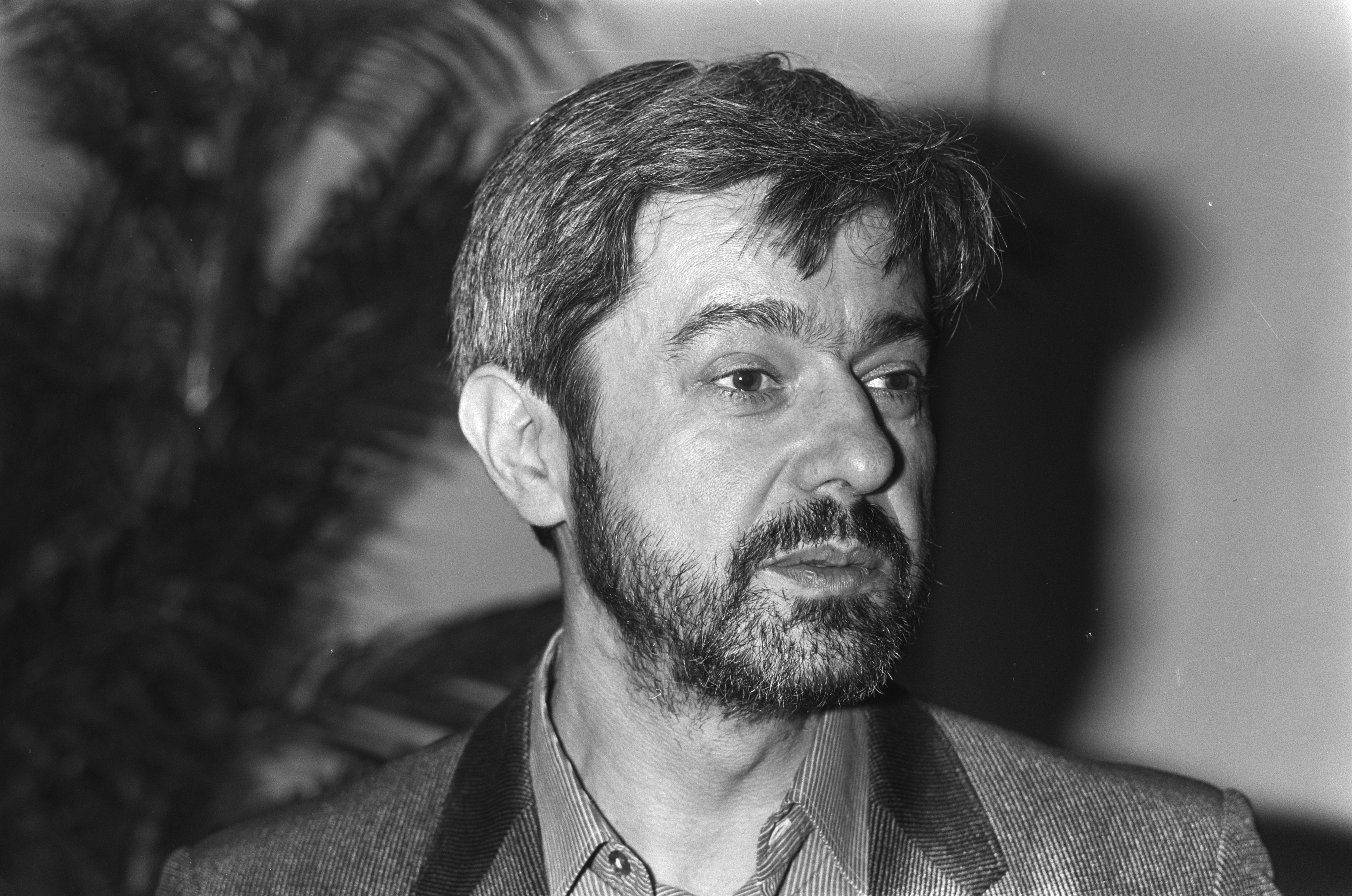 Collectie / Archief : Fotocollectie Anefo Reportage / Serie : [ onbekend ] Beschrijving : De Duitse schrijver Jurek Becker, in 1976 in de DDR uit de partij geroyeerd in verband met zijn opvattingen in de zaak Wolff Biermann, verblijft voor een lezing in Amsterdam Datum : 14 november 1981 Locatie : Amsterdam, Noord-Holland Trefwoorden : portretten, schrijvers Persoonsnaam : Becker, Jurek Fotograaf : Croes, Rob C. / Anefo Auteursrechthebbende : Nationaal Archief Materiaalsoort : Negatief (zwart/wit) Nummer archiefinventaris : bekijk toegang 2.24.01.05 Bestanddeelnummer : 931-8023